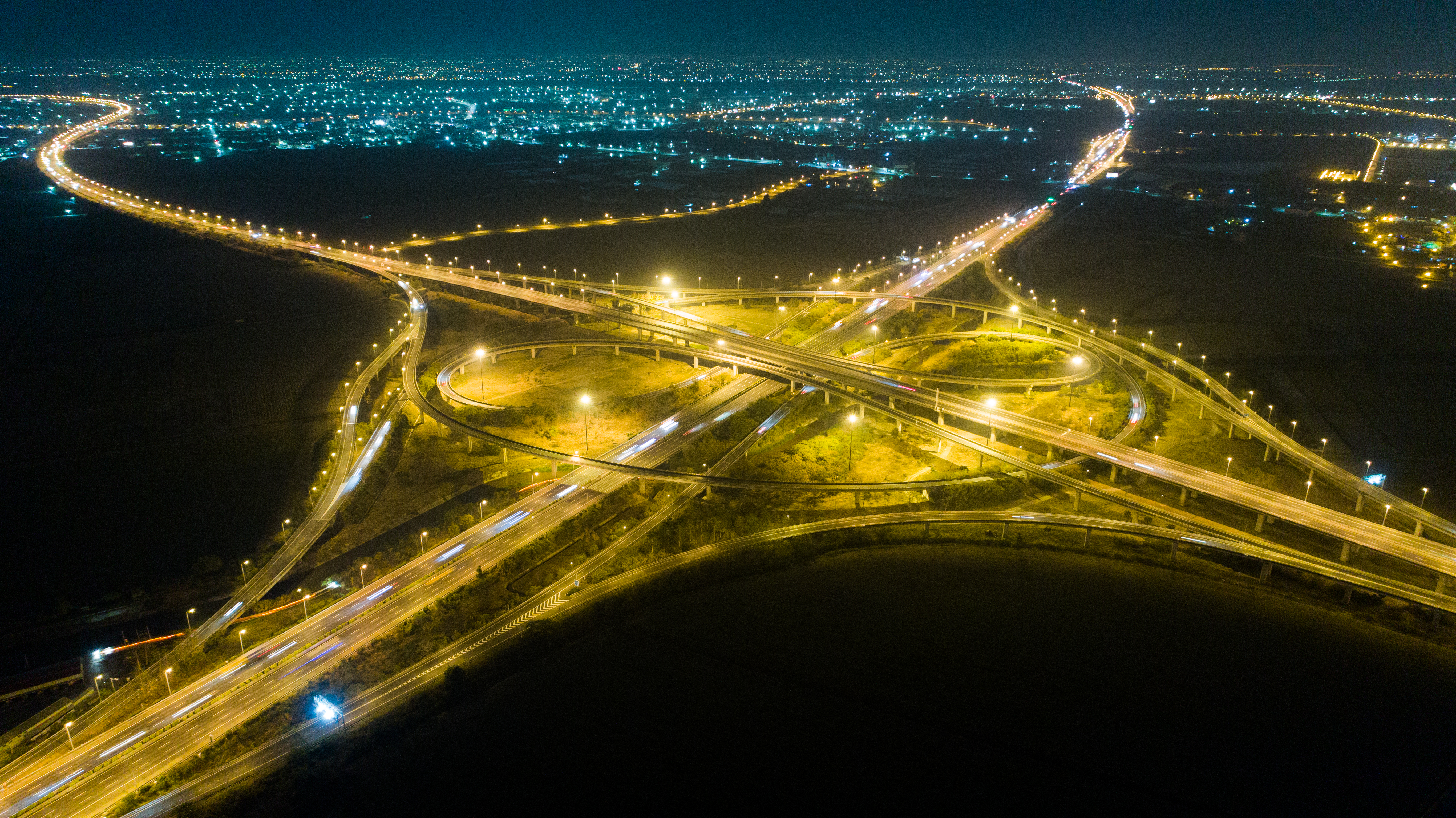 半夜的台南系統交流道